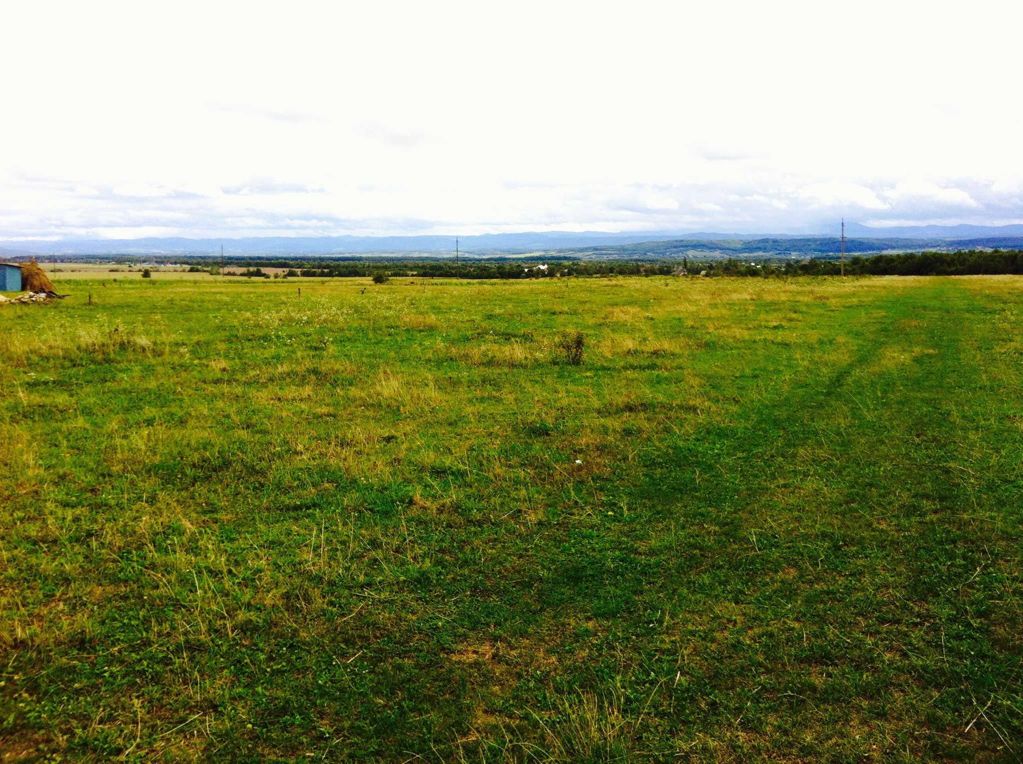 Пейзаж полей и гор в селе Лесная Слободка.